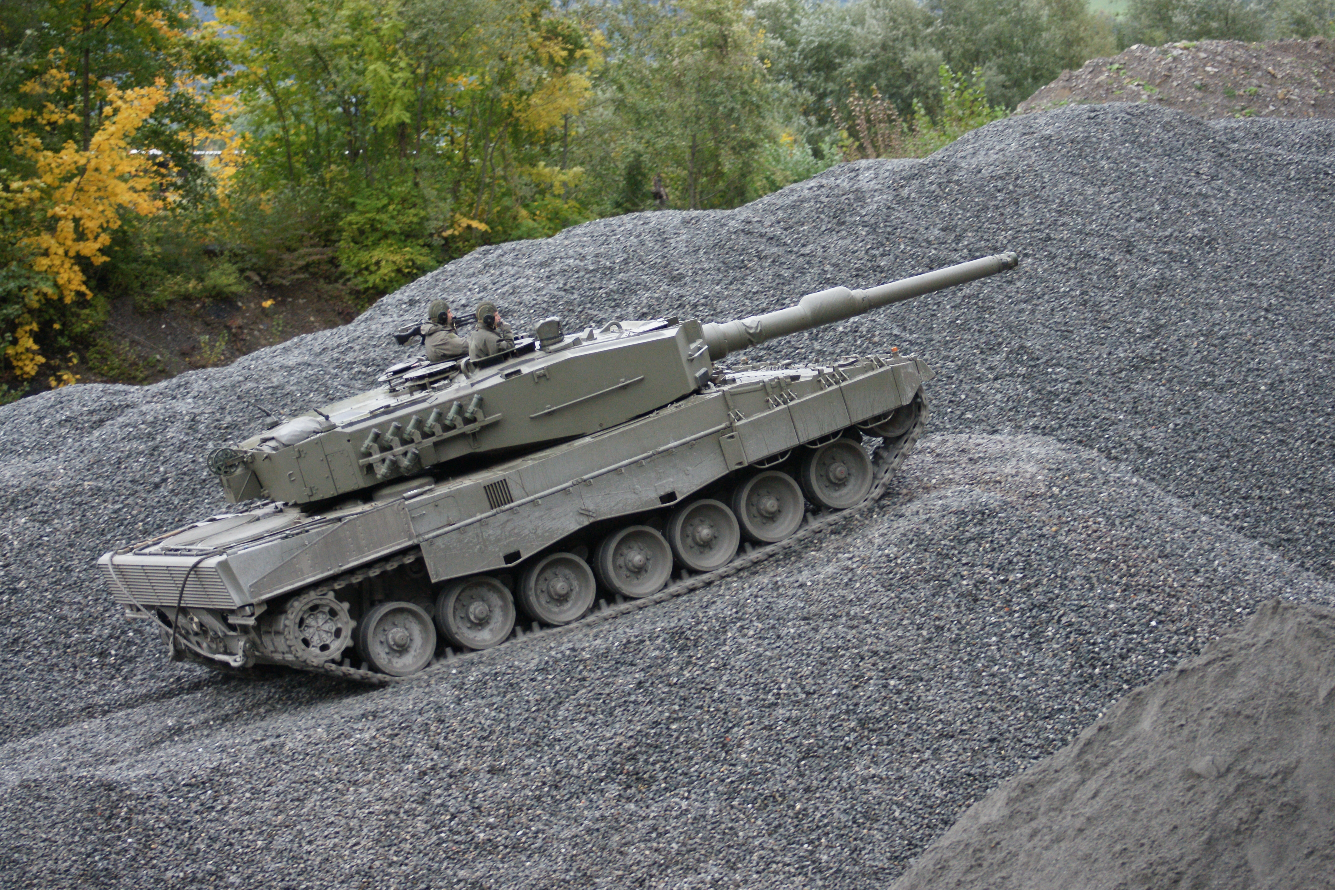 Im Zuge einer Road-Show zeigte das Österreichische Bundesheer im Dornbirner / Hohenemser Steinbruch den Kampfpanzer Leopard 2A4. Er ist das Hautwaffensystem der österreichischen Panzertruppe. Als Hauptwaffe verfügt der Panzer über eine 120 Millimeter Kanone. Die starke Motorisierung sorgt trotz der starken Panzerung für die enorme Beweglichkeit des Fahrzeuges.